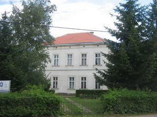 Основна школа Радомир Лазић у селу Азања